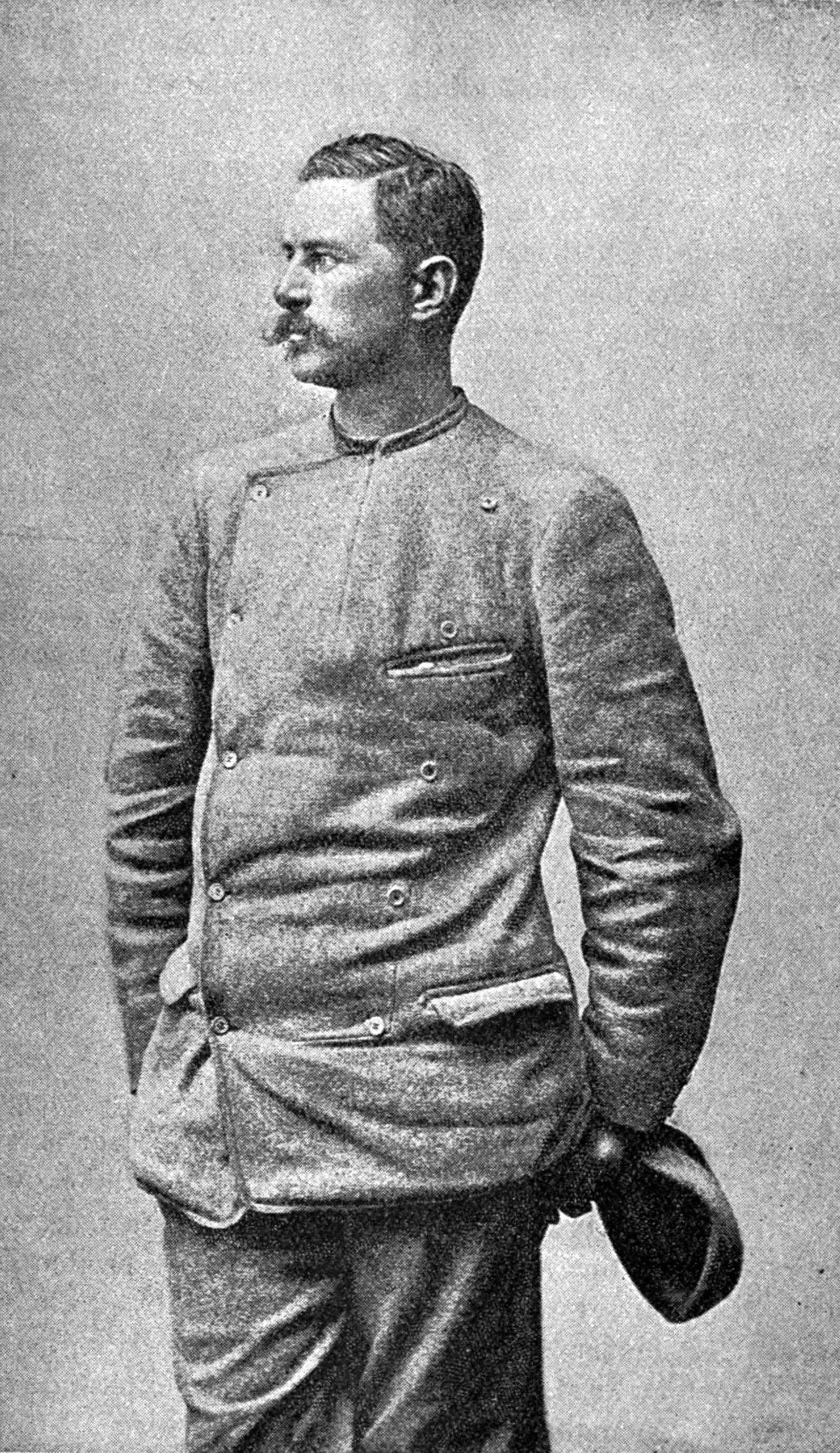 Олаф Кристиан Дитриксон - норвежский полярник, премьер-капитан норвежской армии, картограф. Участник Гренландской экспедиции Нансена